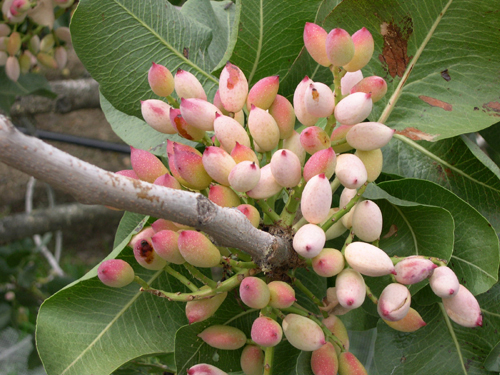 Pistacchio di Bronte in maturazione, Sicilia - Italia.